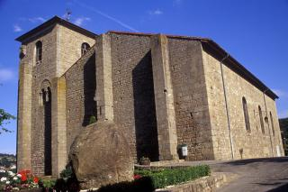 le temple de diane à desaignes,Le Temple de l’Église Réformée